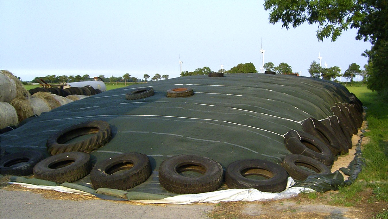 Grassilo als Fahrsilo auf einem betonierten Platz. Das mit Ladewagen geschnittene Gras wurde mit einem Walztraktor verdichtet, dann mit einer zweischichtigen Silofolie abgedeckt und durch ein Kunstfasernetz gegen Beschädigungen durch Vögel geschützt. Die Folie wurde mit Sand und kiesgefüllten Schläuchen unten Abgedichtet und mit an Seilen darüber gehängten LKW-Reifen beschwert.